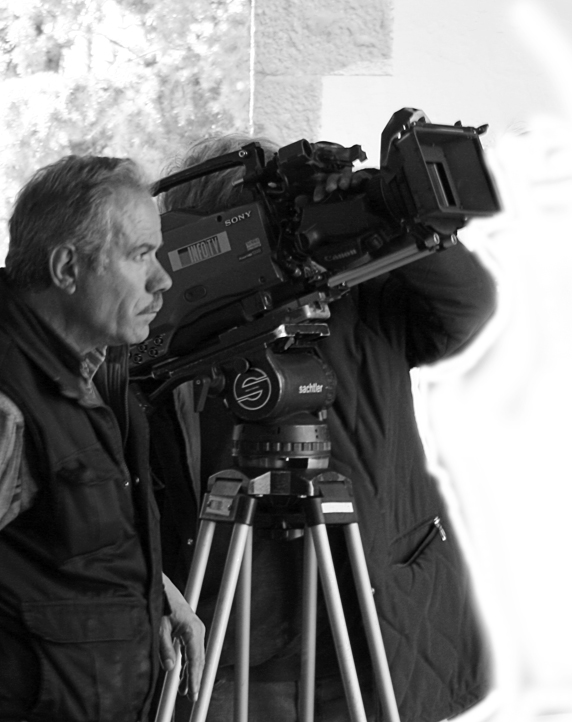 Francisco Rodríguez rodando "El Camino del Cid"